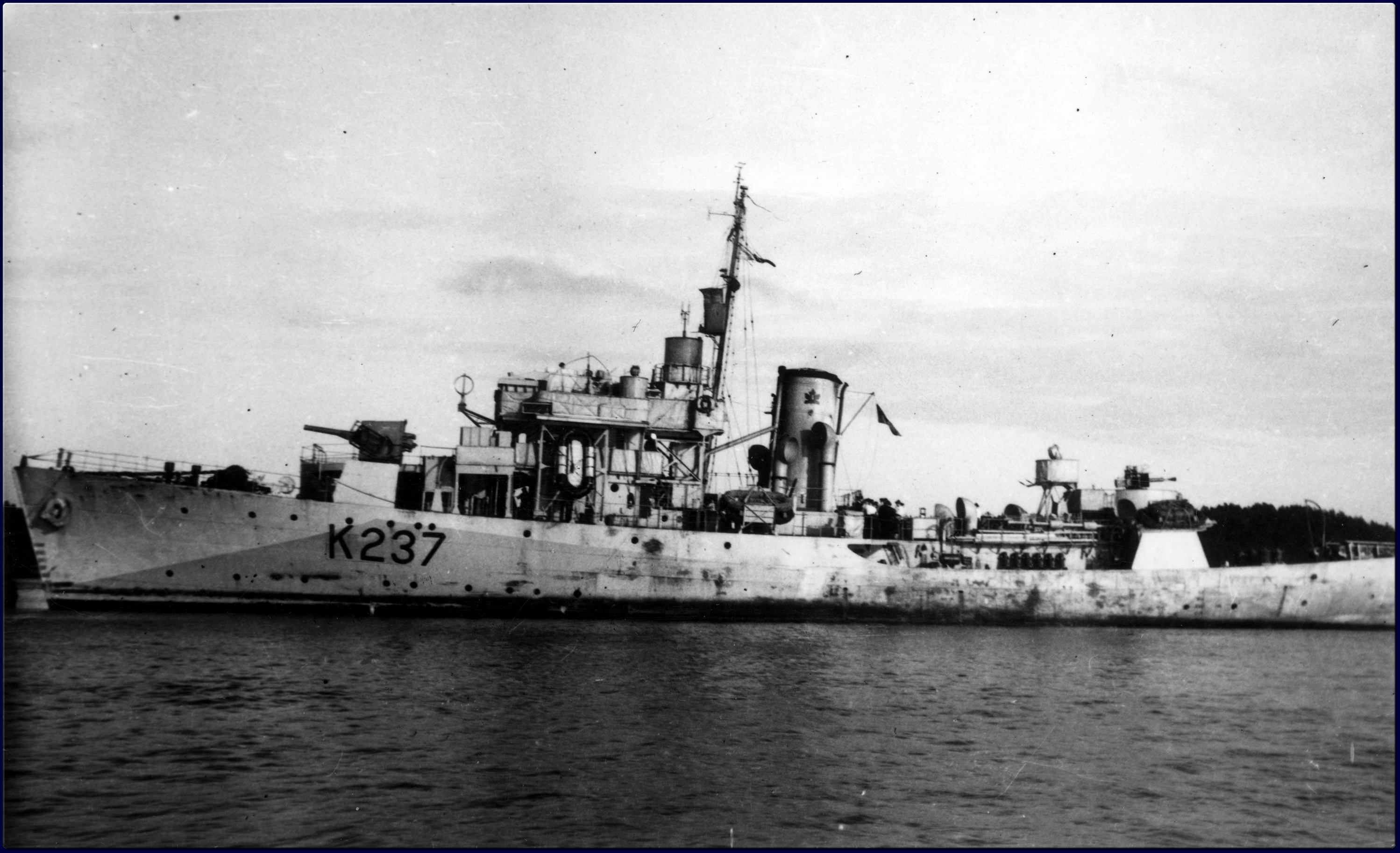 HMCS Halifax (K237), circa 1943-1945.